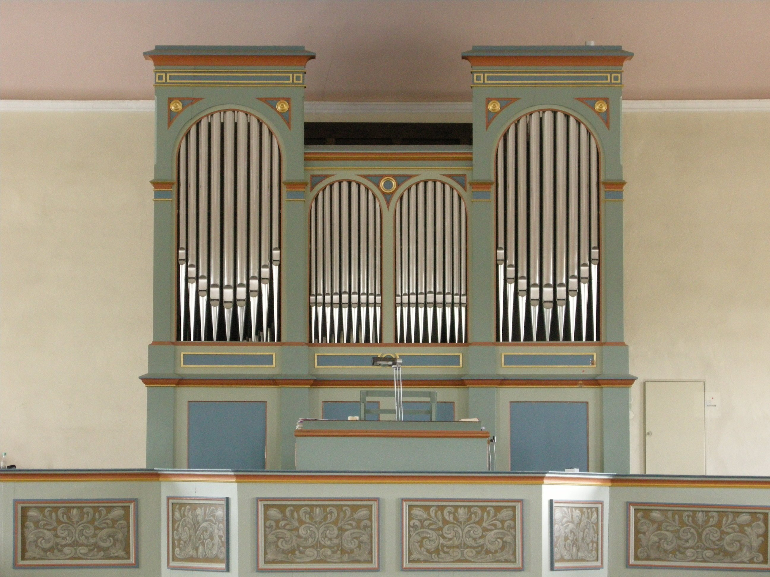 Die von Heinrich Voigt 1889 erbaute Orgel der Ev. Kirche Taunusstein-Wehen